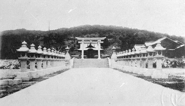 中文（台灣）: 高雄神社，西元1929年（昭和4年）建於壽山山腰，供奉日神大物主尊、崇德天皇及能久親王。小學時代赴神社參拜，則是許多老高雄人的共同記憶。二戰後改建為忠烈祠，供奉革命先烈靈位，另外亦名列高雄觀光勝地之一。